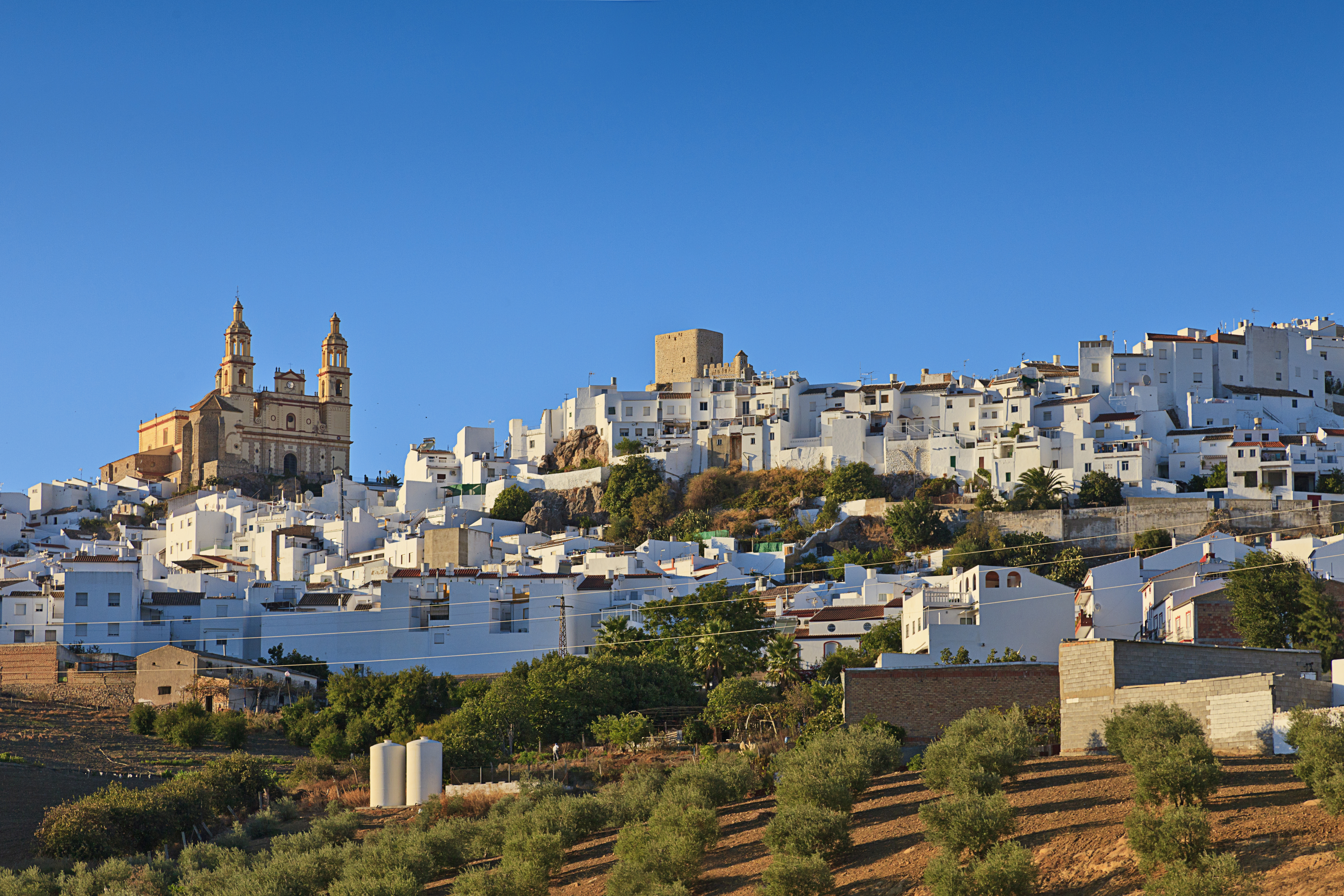 Olvera. Cádiz. Andalusia. Spain